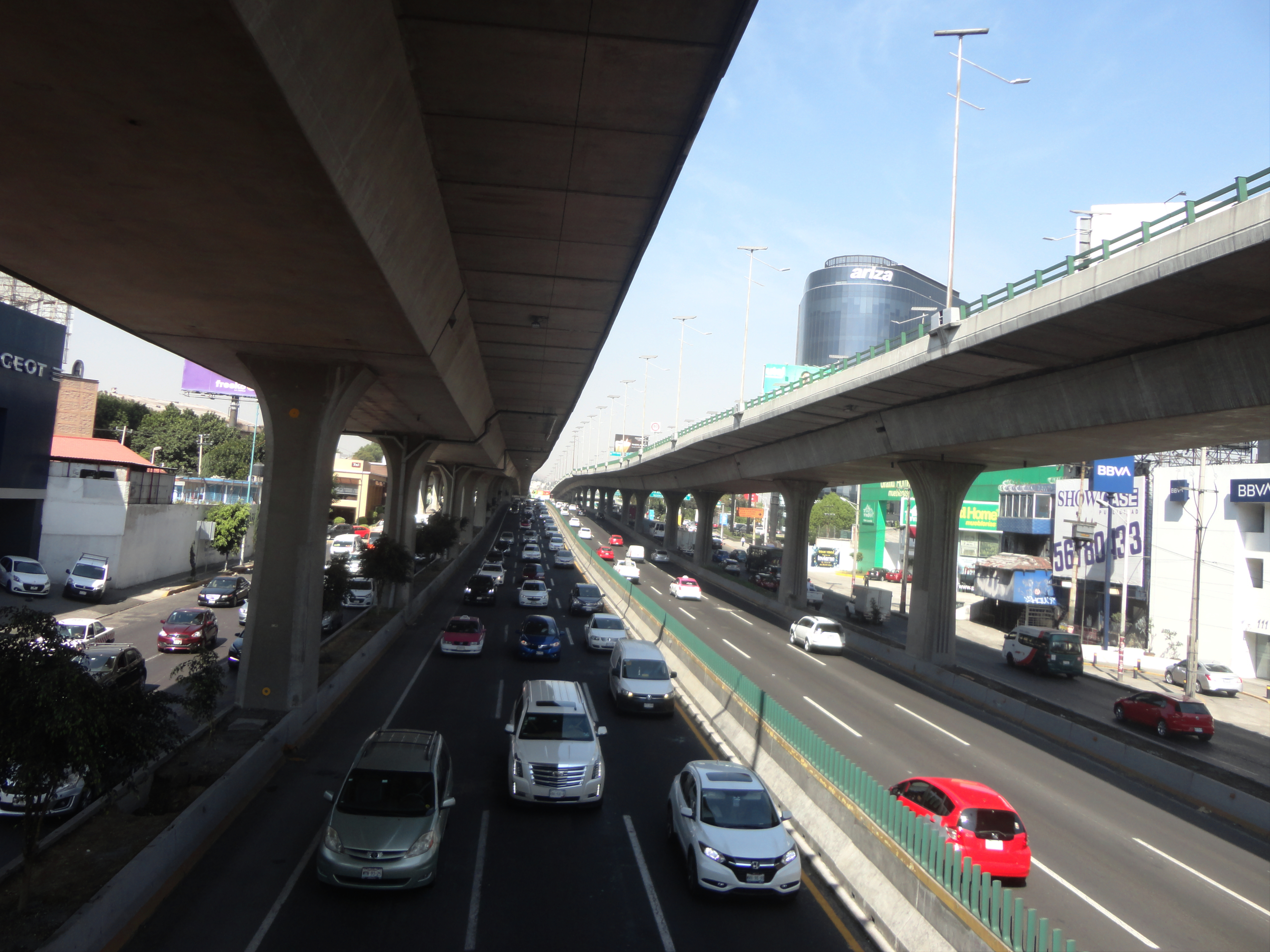 Boulevard Manuel Ávila Camacho, Naucalpan de Juárez, Estado de México, México.